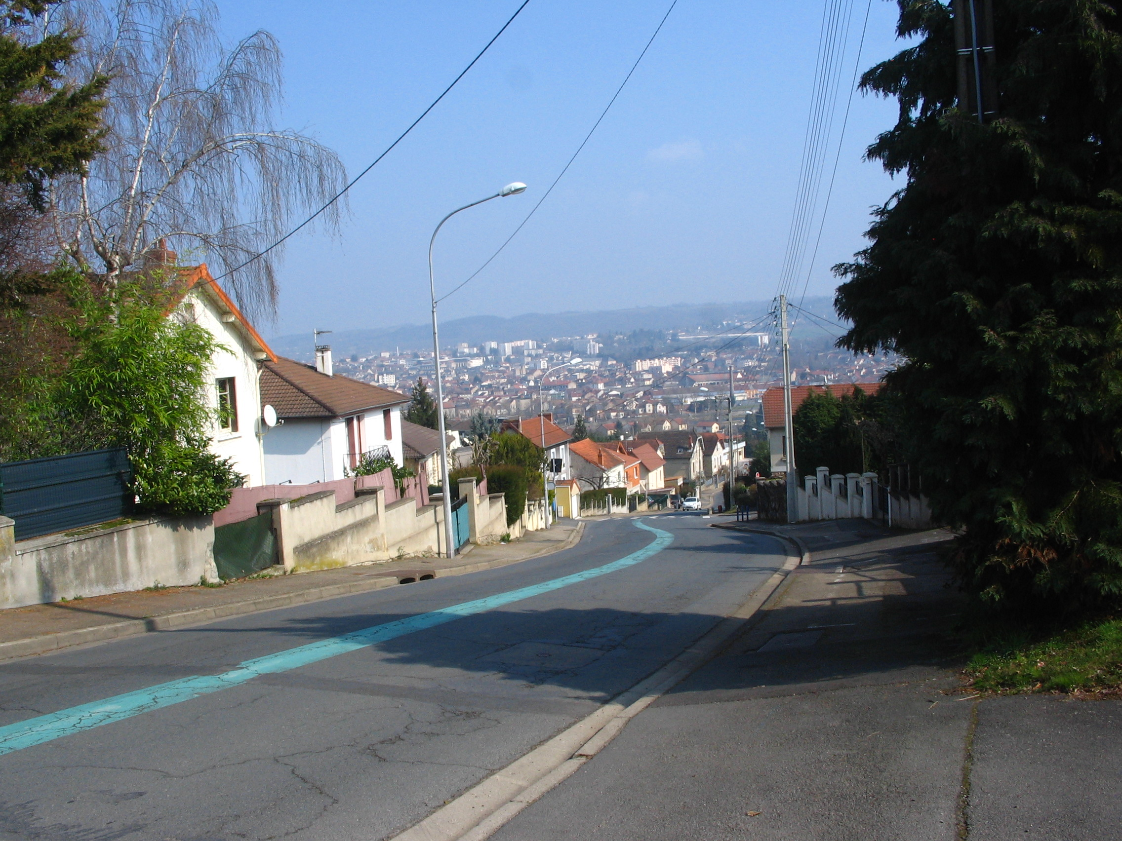 Rue Buffon à Montluçon (03).